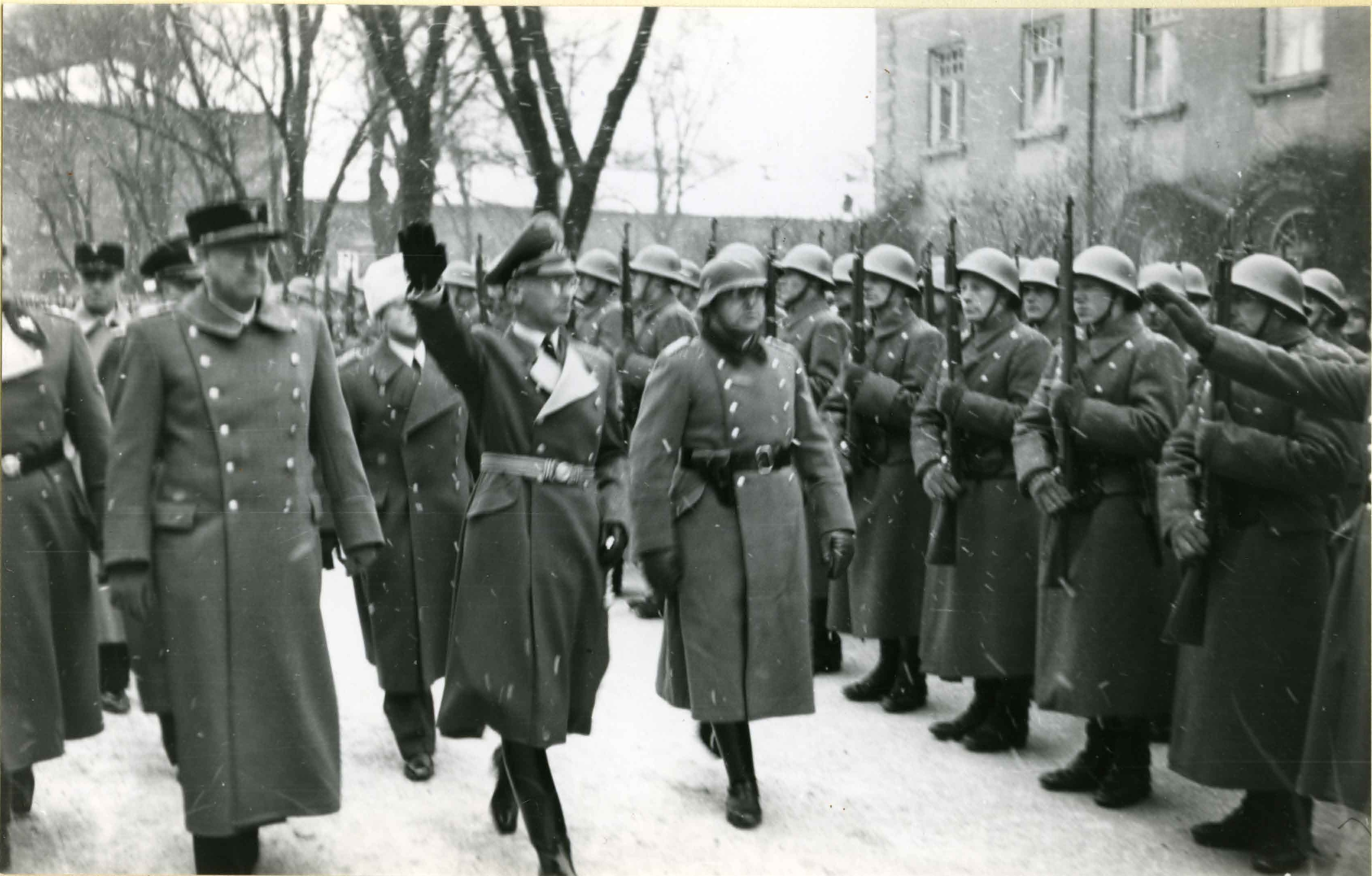 I forbindelse med Statsakten. Fotograf: trolig NTB. Fra album: 1-2-1942. RA/PA-0750/H/0002/ 1033 «Statsakten» var en seremoni på Akershus slott i Oslo under andre verdenskrig 1. februar 1942 da rikskommissar Josef Terboven innsatte Vidkun Quisling, leder for Nasjonal Samling (NS), som «ministerpresident» i Norge, og de tyskkontrollerte kommissariske ministerne ble erstattet av «den nasjonale regjering» utgått fra NS. «Statsakten» markerte at Quisling fikk den formelle makta i Norge, og ved lov av 12. mars 1942 ble NS «statsbærende parti». Quisling hadde håp om at ordninga også skulle gi NS reell makt og føre til fred mellom Norge og Tyskland, men tysk tilsynsforvaltninga gjennom Reichskommissariat Norwegen fortsatte som før inntil frigjøringa 8. mai 1945.